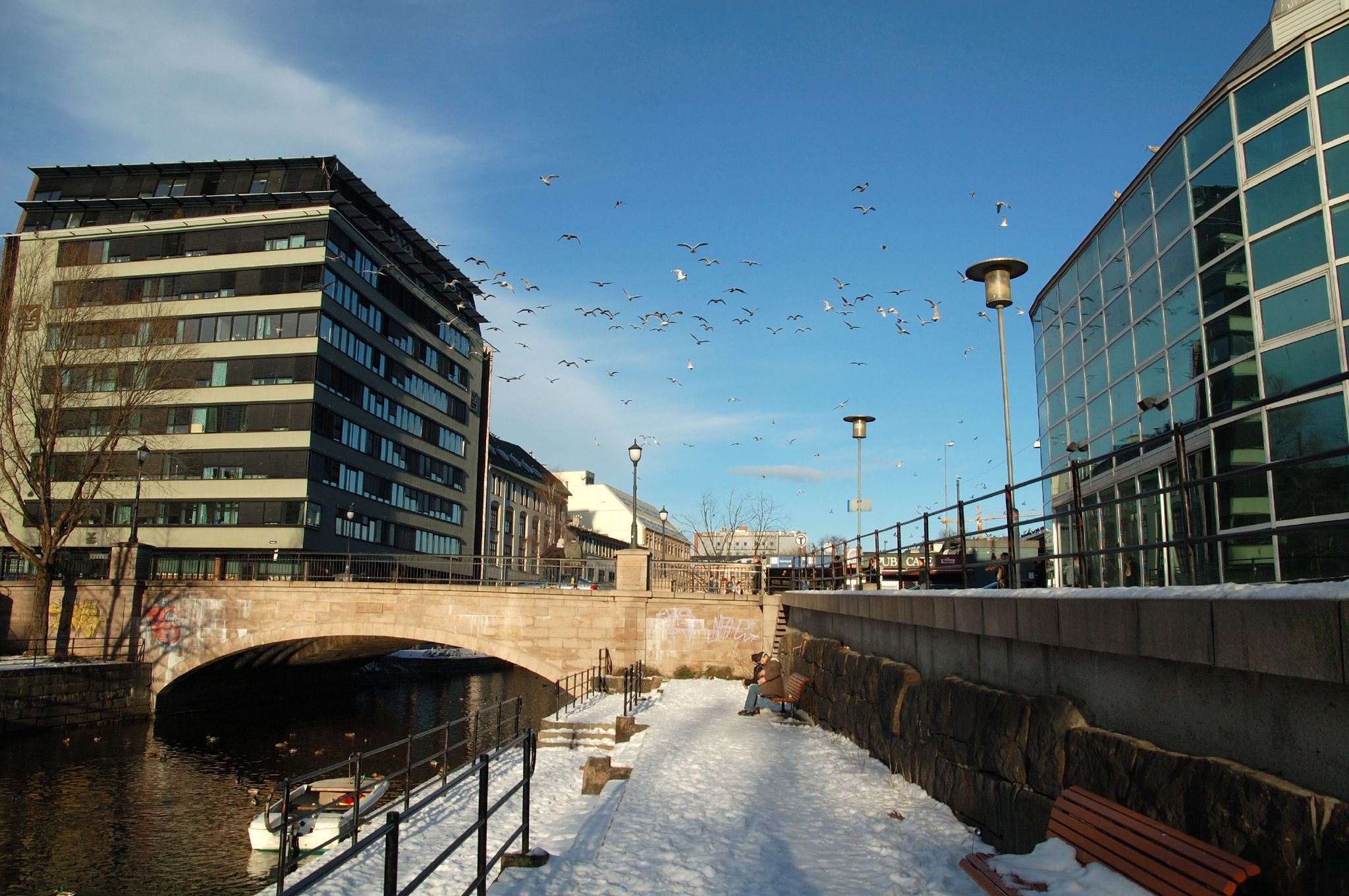 Vaterlands bro i 0slo